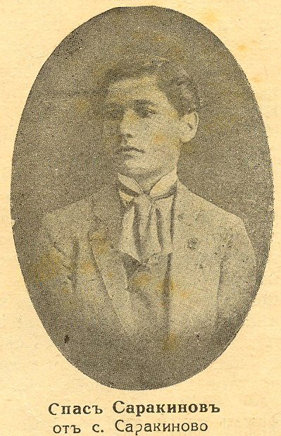 Спас Саракинов.